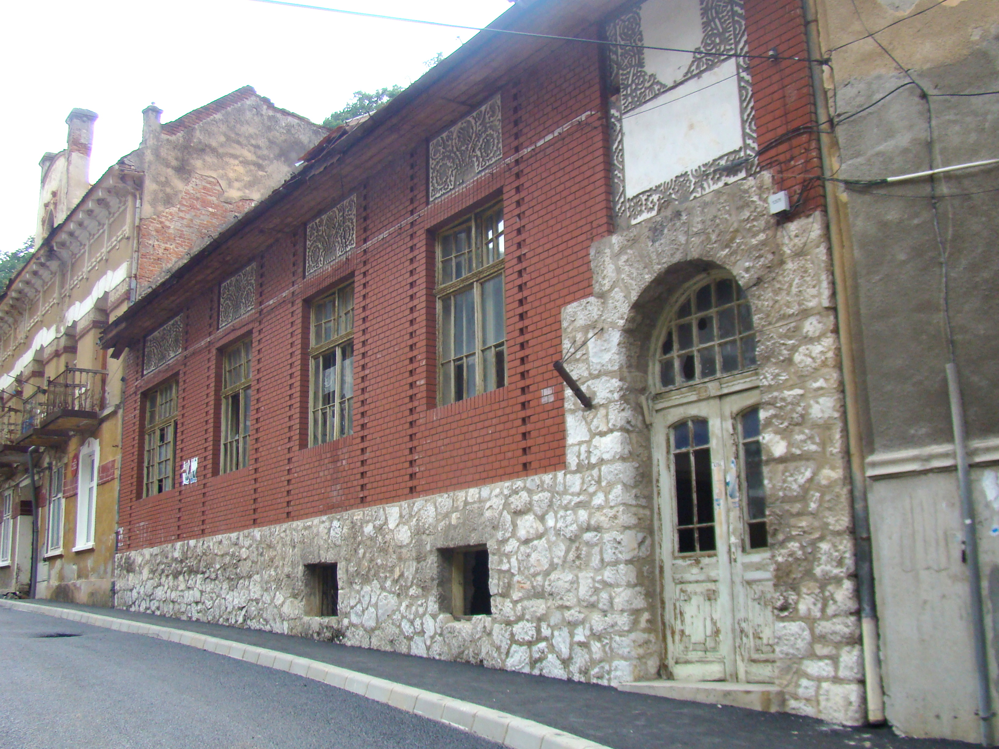 Vilă, oraș Băile Herculane, Str. Stoica de Hațeg Nicolae 2